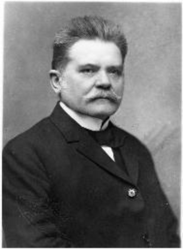 Bleyer Jakab (Dunacséb, 1874. január 25. – Budapest, Józsefváros, 1933. december 5.) magyar irodalomtörténész, egyetemi tanár, miniszter.